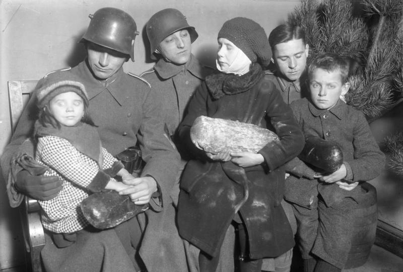 Weihnachtsbescherung bedürftiger Kinder bei der Reichswehr! Die Wachtruppe der Reichswehr in Berlin bereitet armen Kindern eine Weihnachtsfreude. Unser Bild zeigt Reichswehrsoldaten mit bedürftigen Kindern nach der Bescherung mit Lebensmitteln.